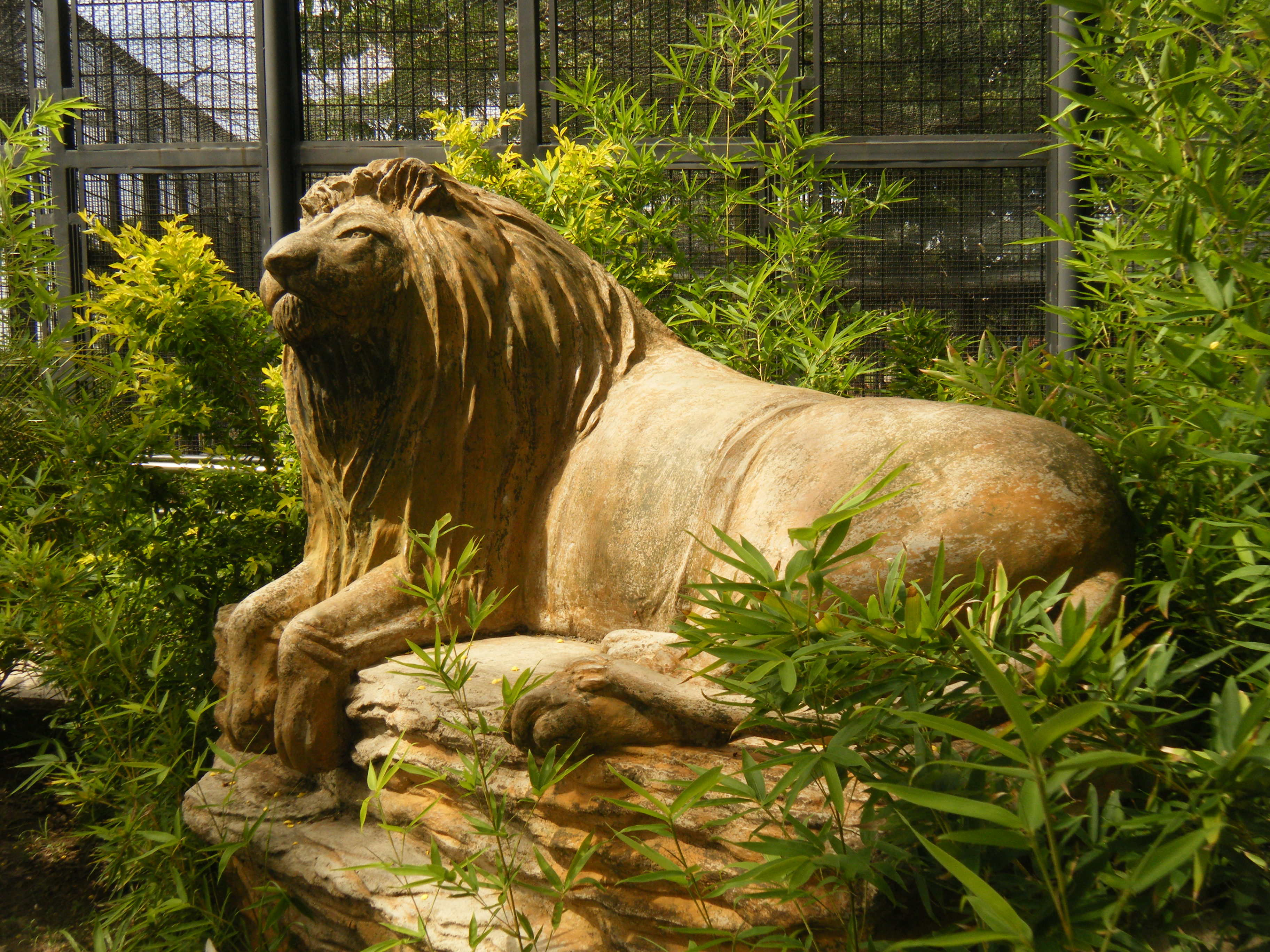 Monumento al Leon Casimiro en el Parque La Guaricha, Maturin.